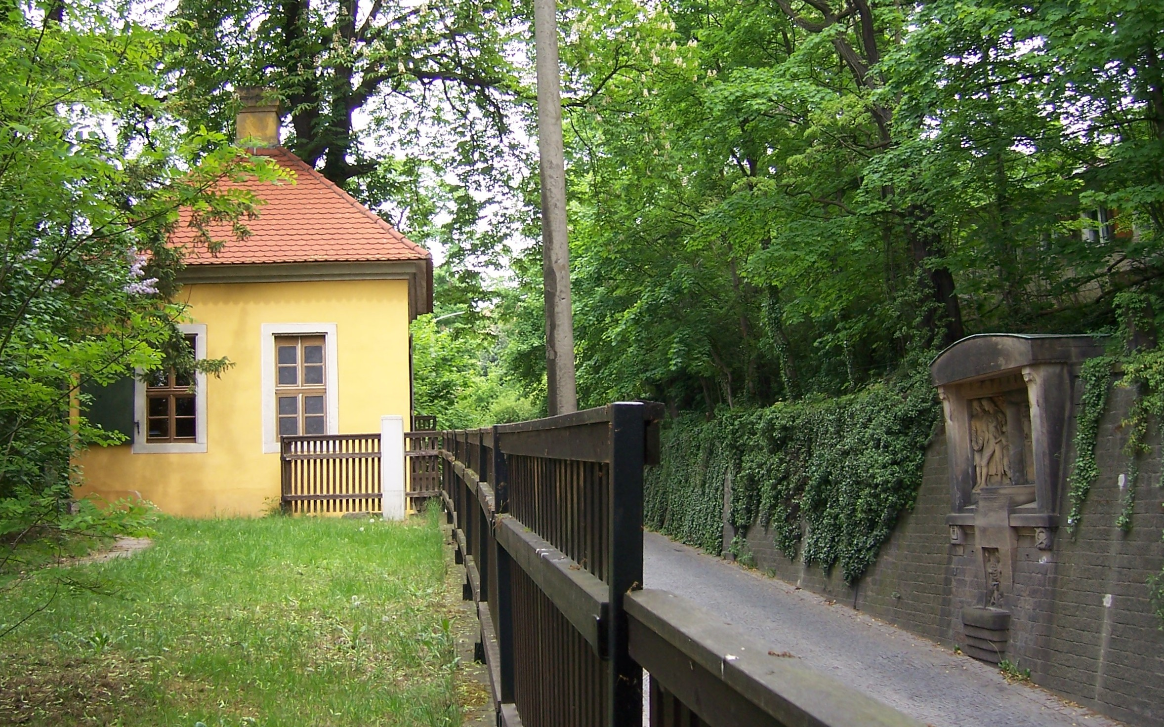 Lage des Schillerhäuschens und des Schiller-Körner-Denkmals in Dresden-Loschwitz